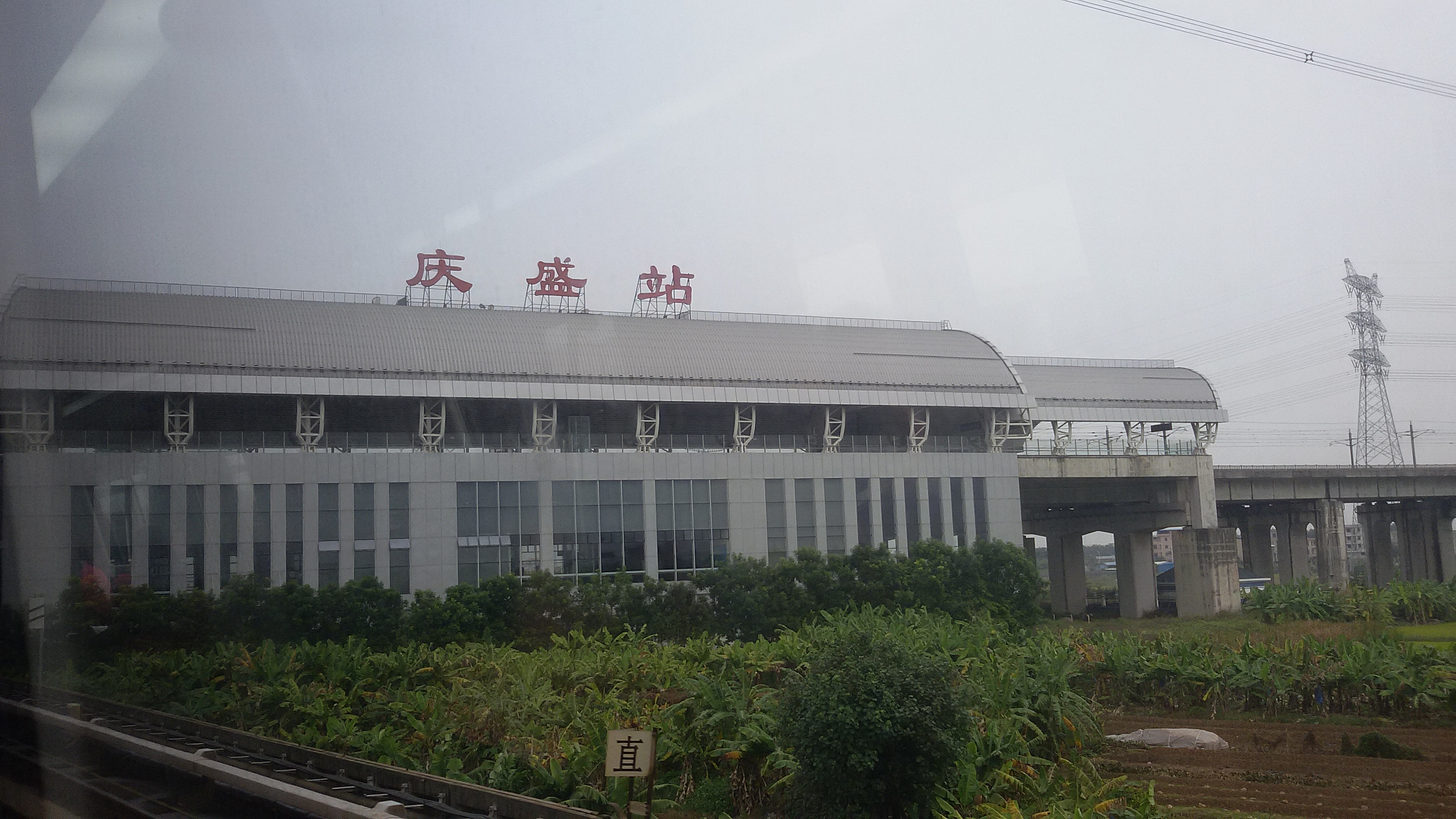 粵語: 高鐵嘅慶盛站個樣